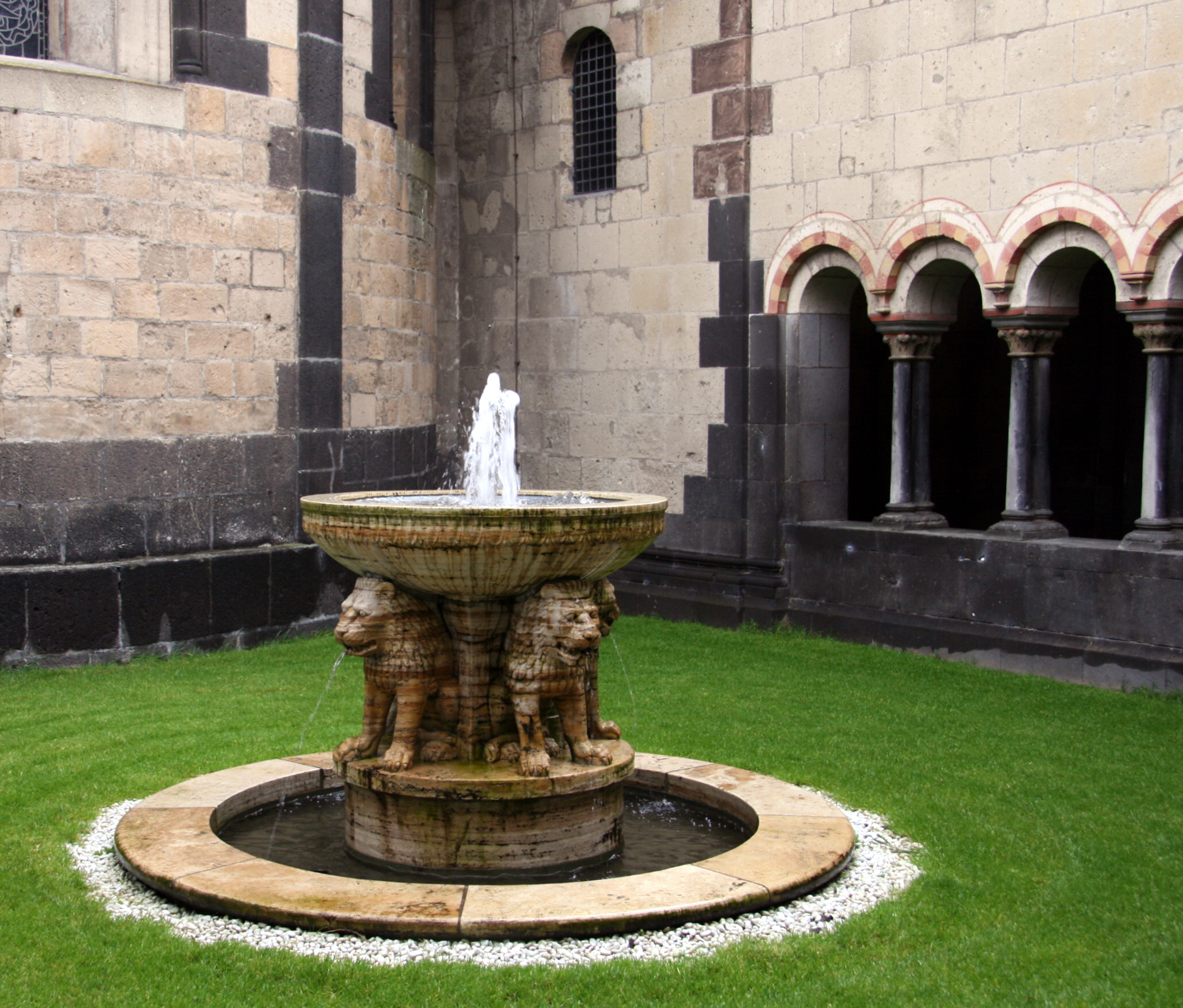 Brunnen innerhalb des Paradieses der Abteikirche Maria Laach, Glees, Landkreis Ahrweiler, Rheinland-Pfalz